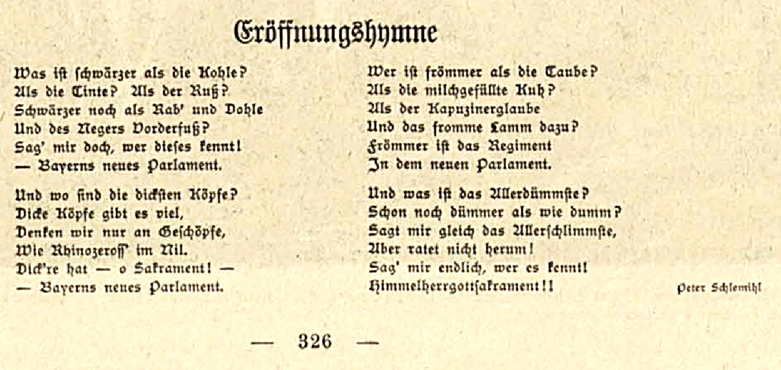 Eröffnungshymne.